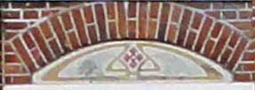 Dwarshuisboerderij Hoofdstraat 77(detail boogtrommel met art nouveauelementen Noordbroek